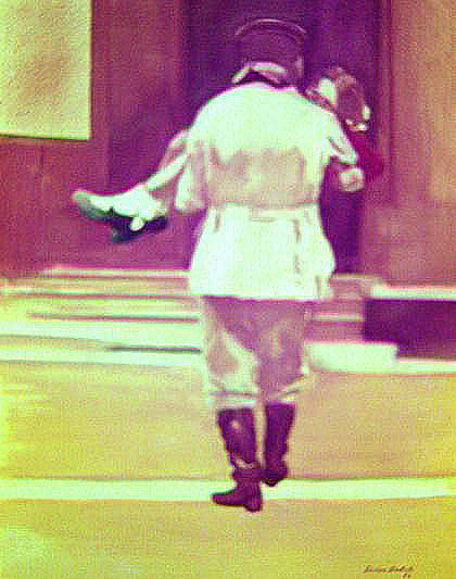 "Guardería" óleo/lienzo 100 x 81 cm.